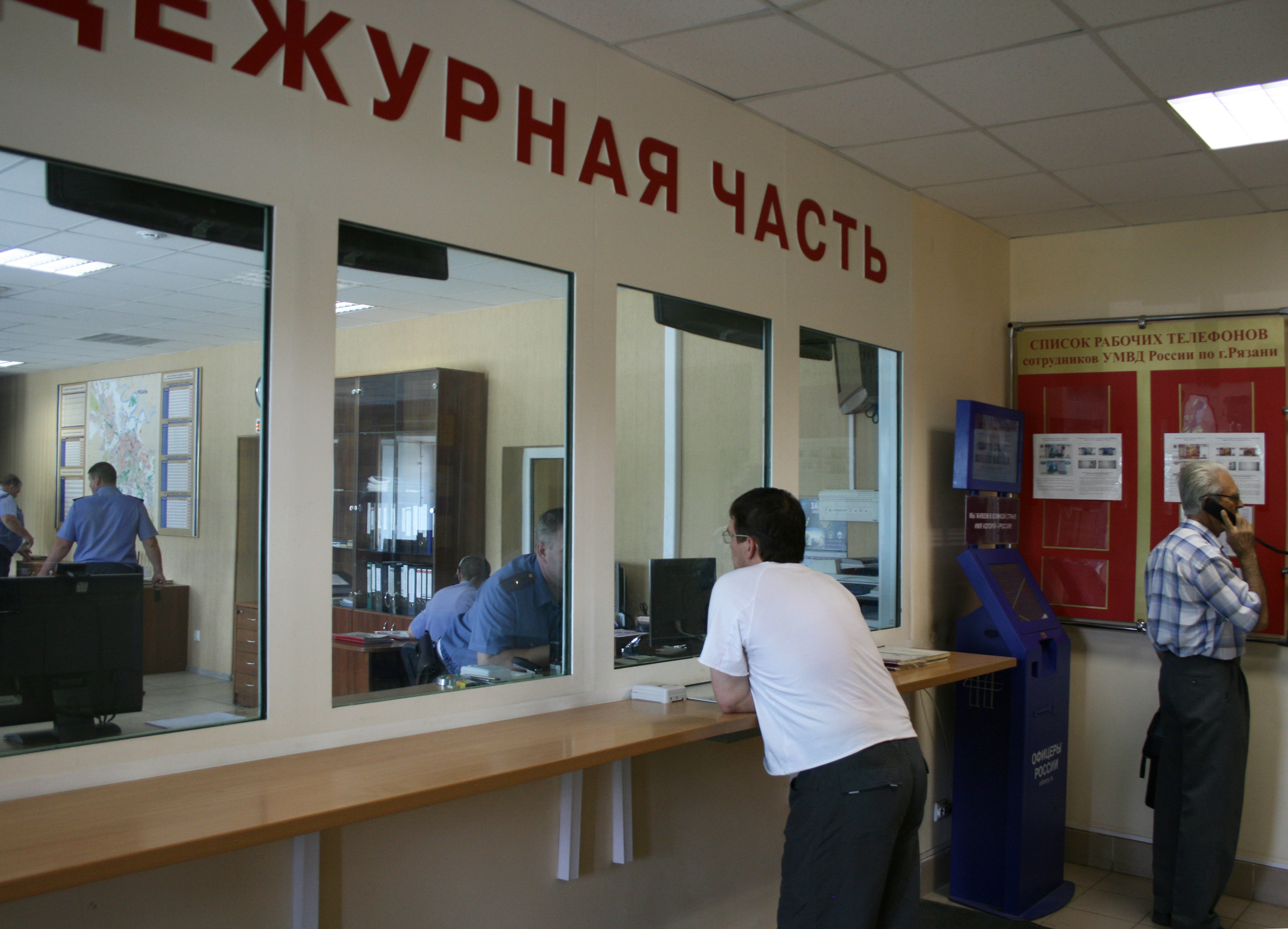 Работа дежурной части территориального органа МВД России